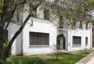 Imagen de la Casa Museo Jorge Eliécer Gaitán (Bogotá - Colombia)